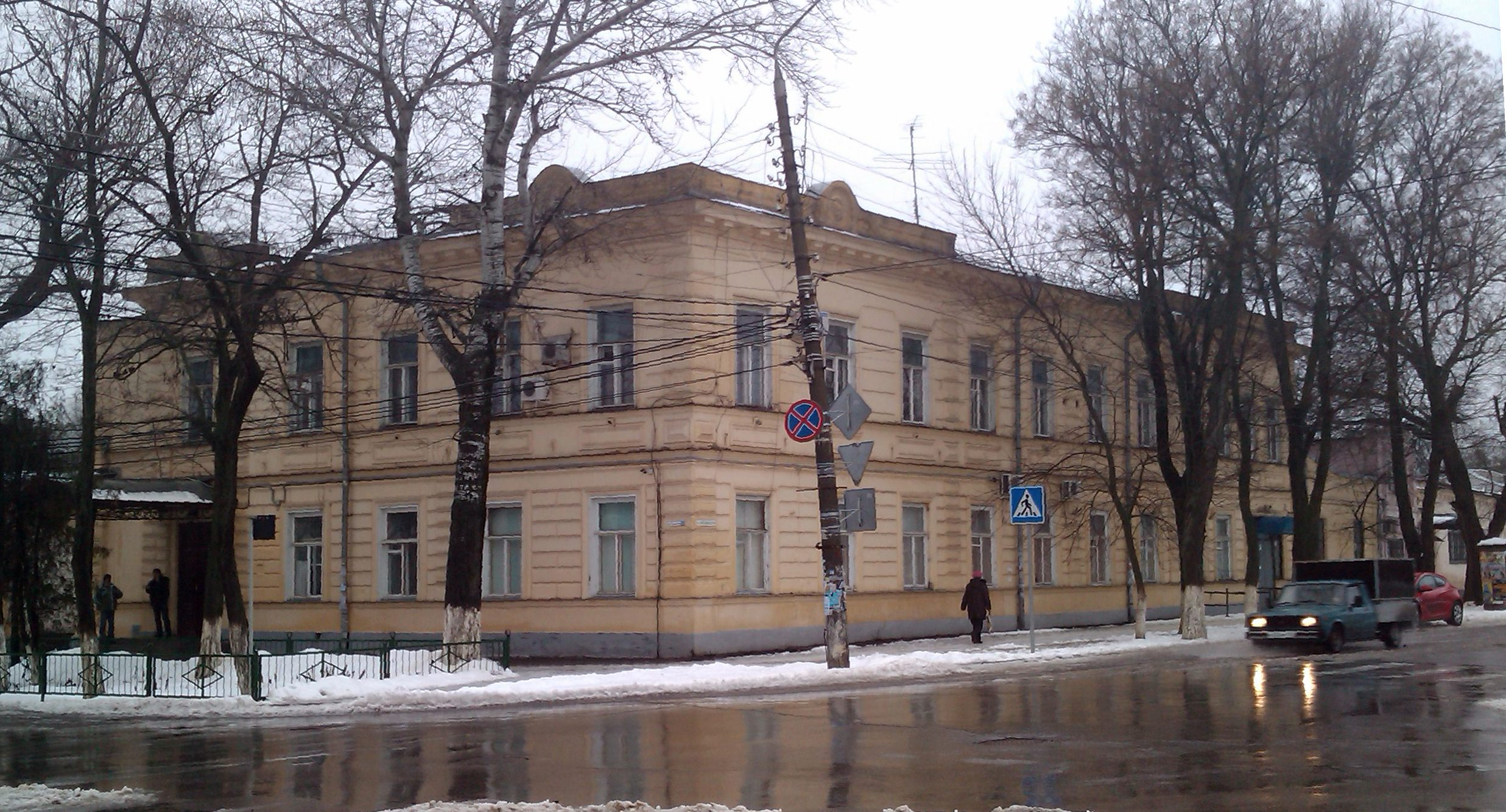 Таганрогский учительский институт. Таганрог, Тургеневский переулок, 32